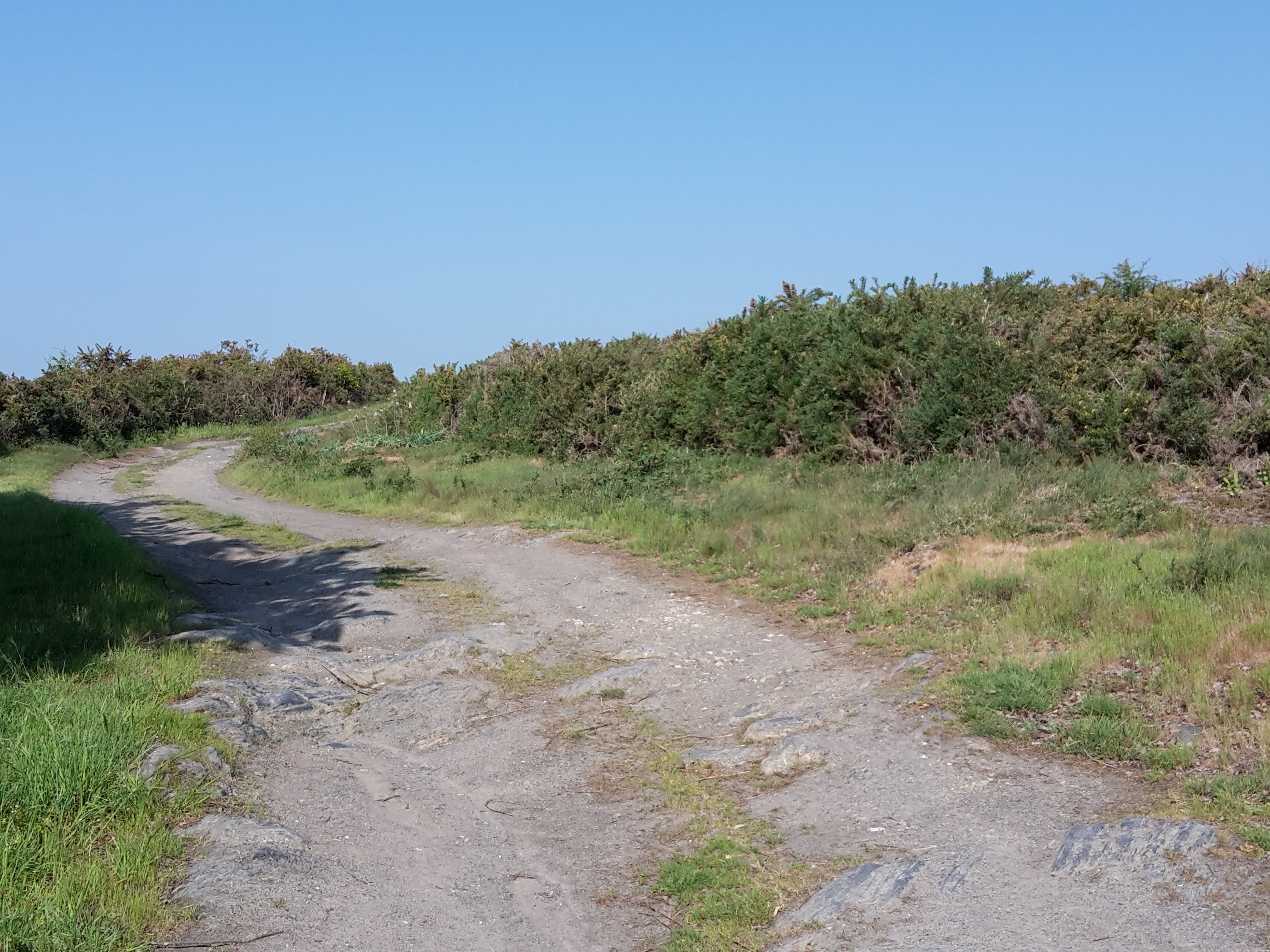 Chemin de l'Ermitage, Le Pin, Loire-Atlantique, France.